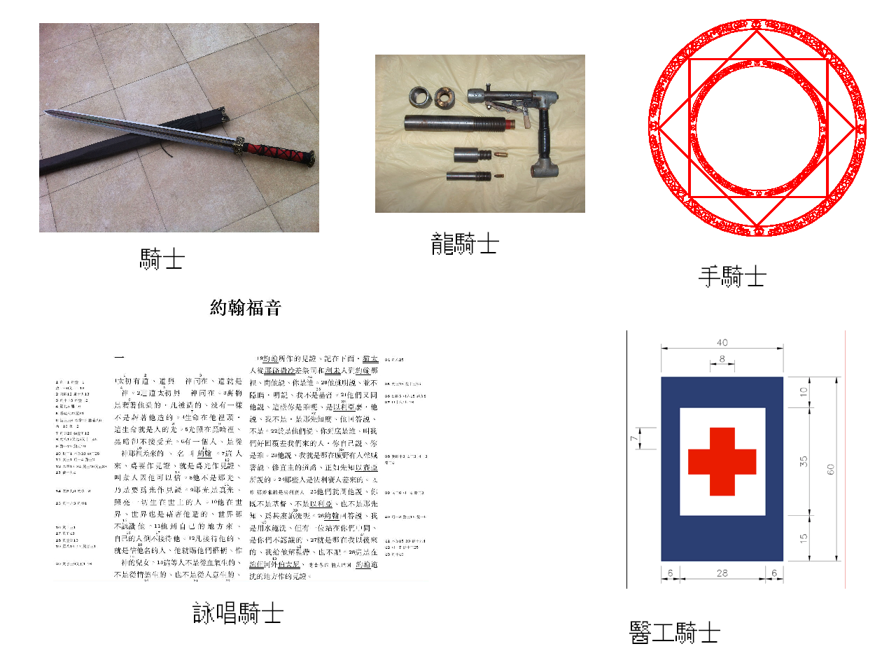 《青之驅魔師》裡各稱號的驅魔師主要的攻擊方式